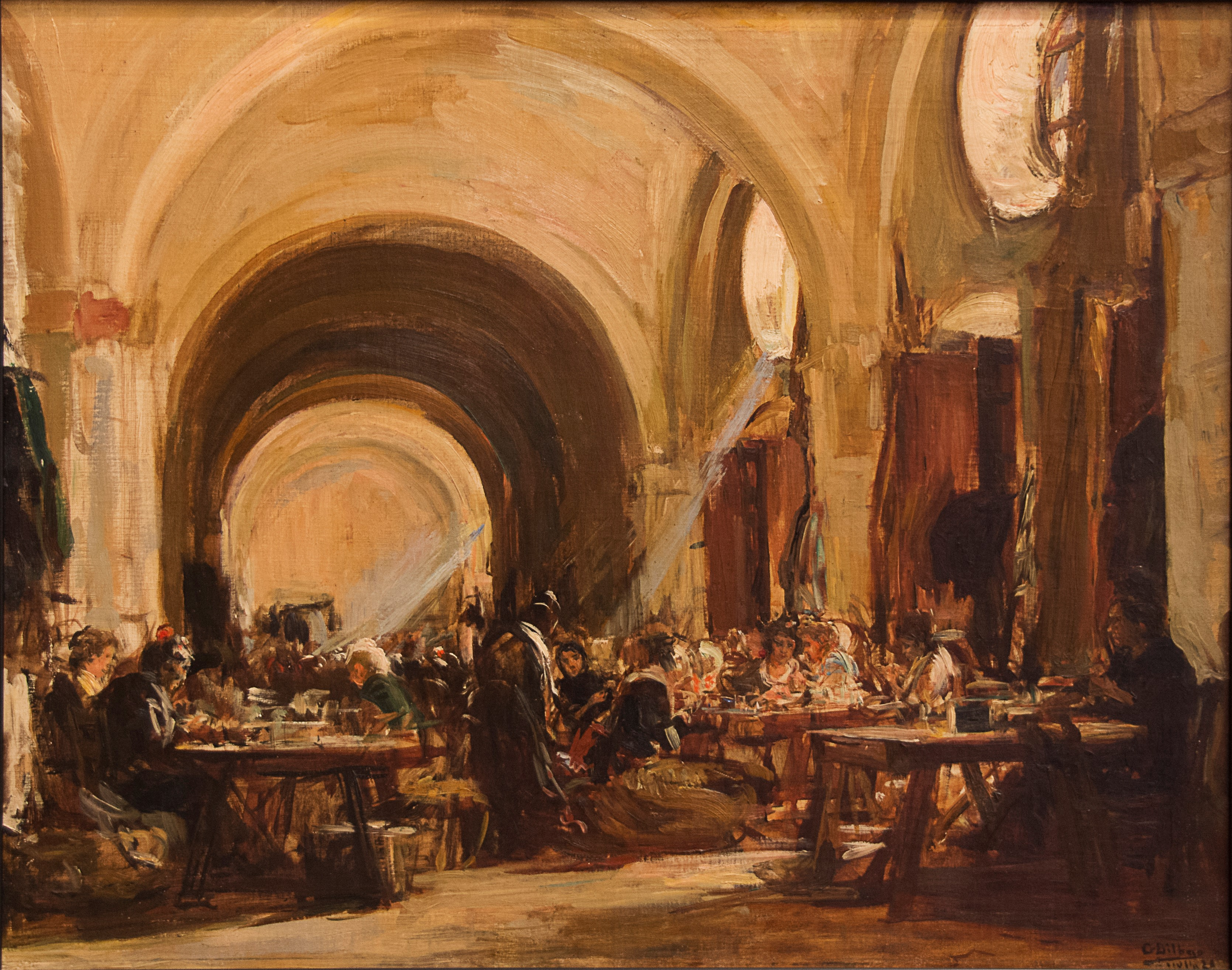 Interior de la fábrica de tabacos (Boceto, 1911) Gonzalo Bilbao